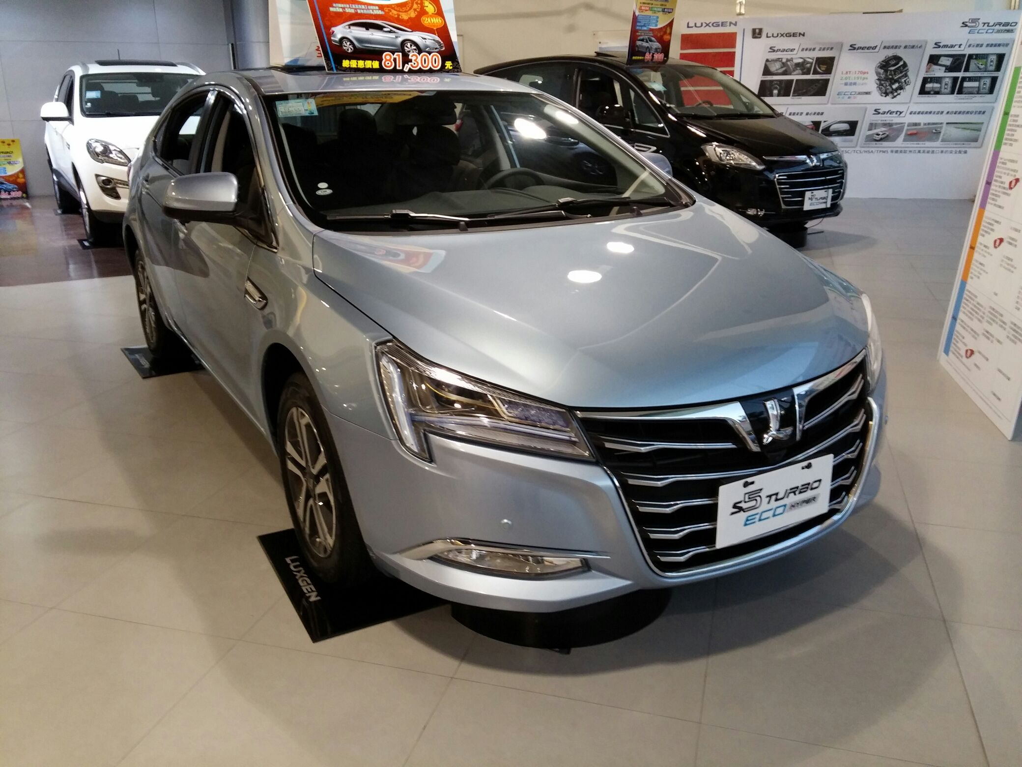 ラクスジェン・S5ターボ